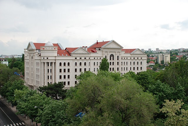 Chisinau. Vedere spre Bd. A. Mateevici